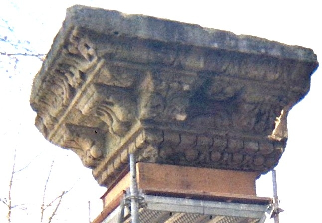 fragment de corniche attribué au temple gallo-romain de Tours